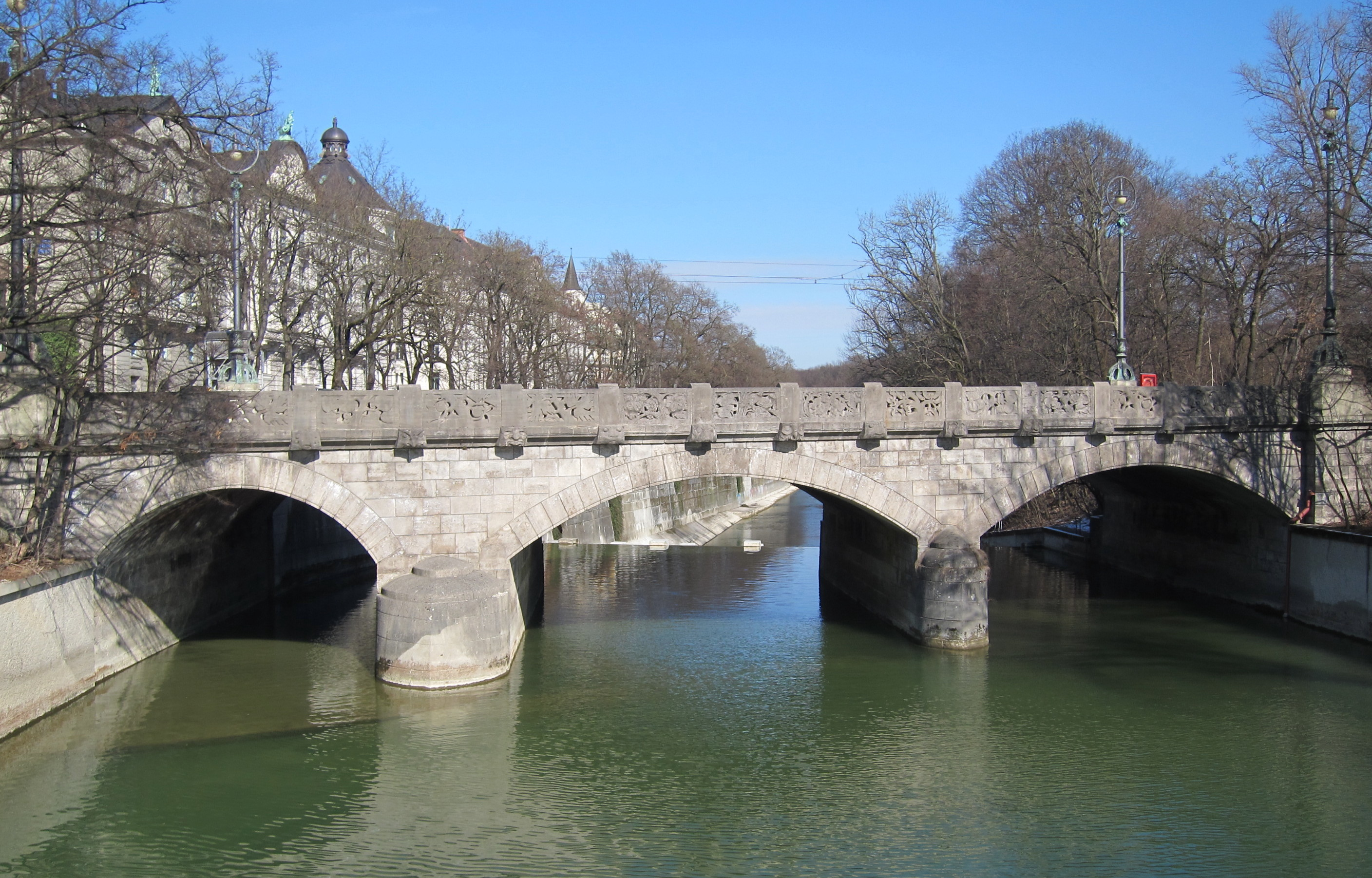 Innere Maximiliansbrücke